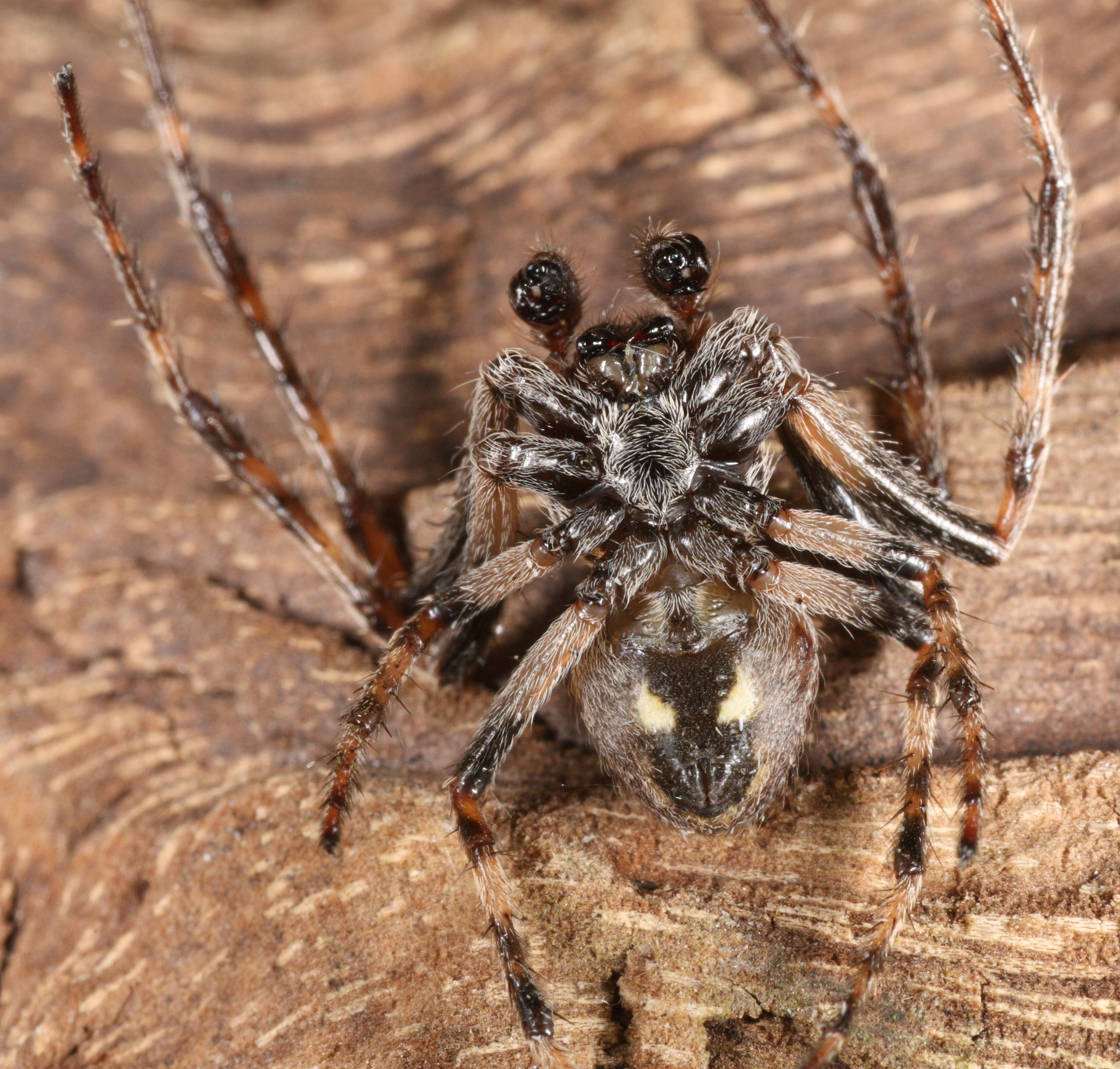 Nattvever Nuctenea umbratica hann underside